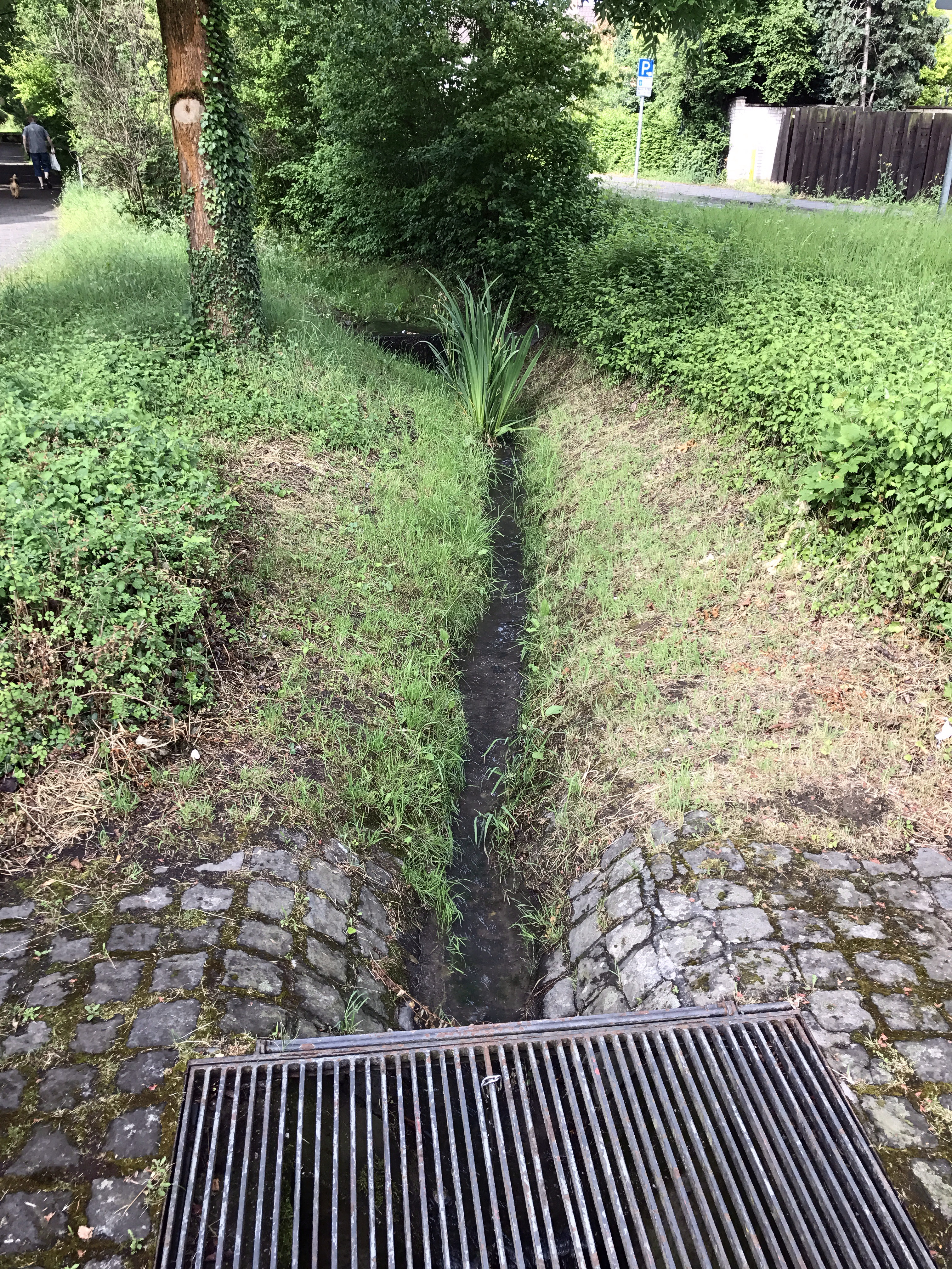 Heilsbach an der Derlestraße (bei Eintritt in die Verrohrung)